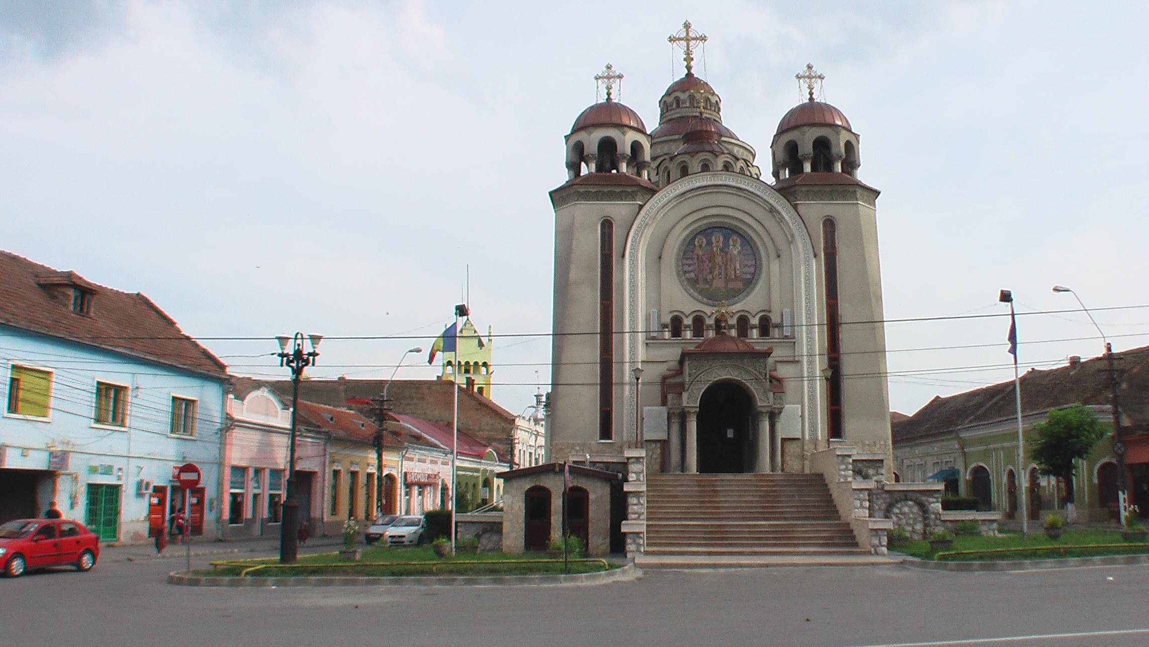 Aiud5